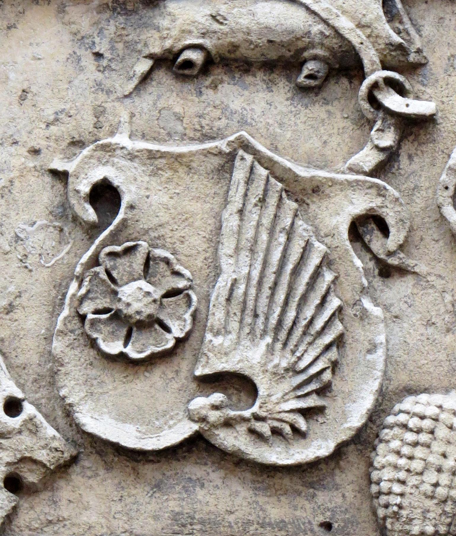 Mogens Jensen Skriver Rosenvinges (d. 1528) våbenskjold, detalje fra pladeinskripton på Rosenvingske Hus, Malmø